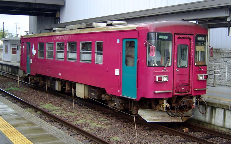 長良川鉄道ナガラ3形気動車（301） 2004年9月5日 美濃太田駅。投稿者(Kone)による撮影。